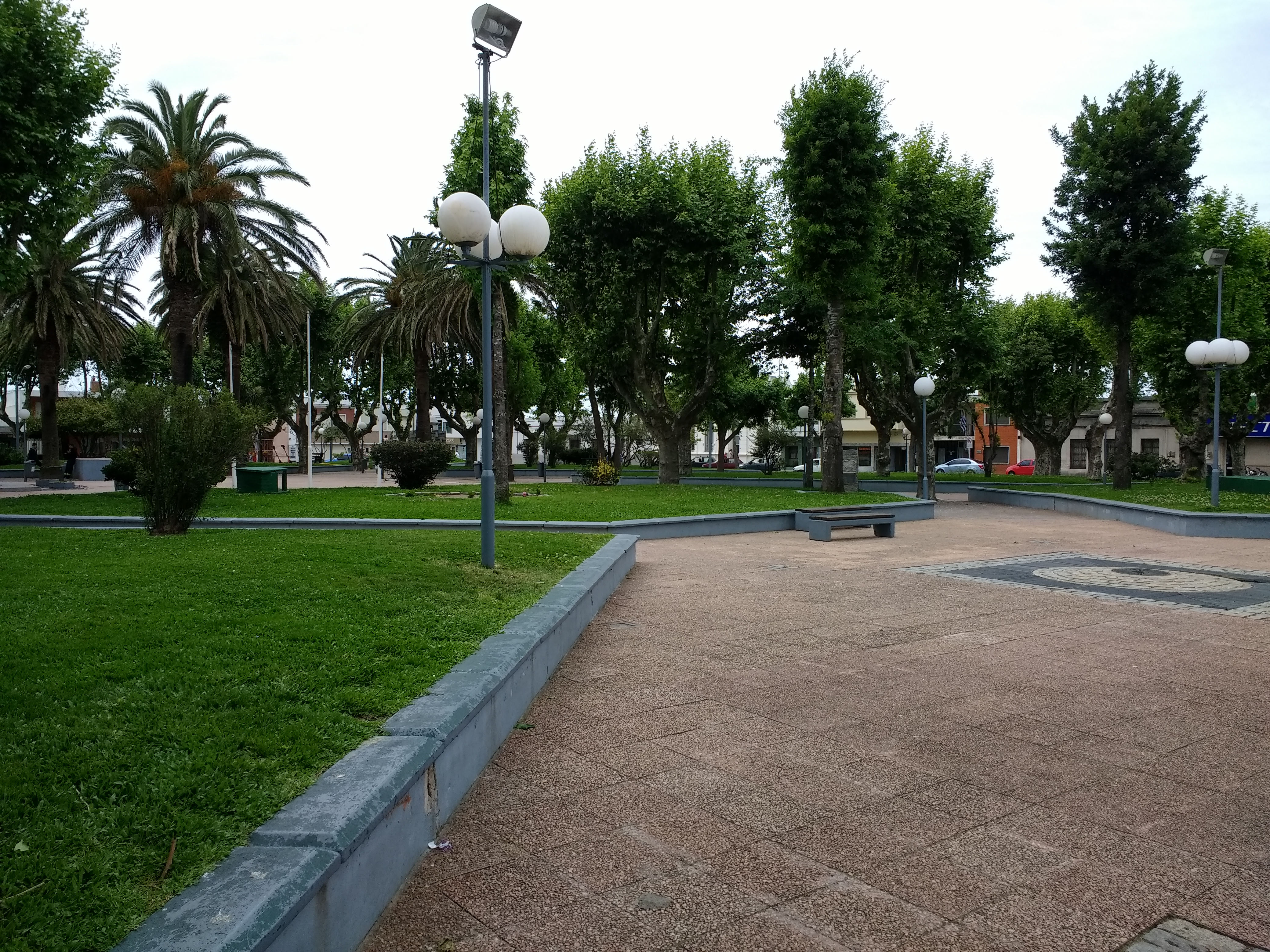 Plaza Artigas, San Carlos, Uruguay.